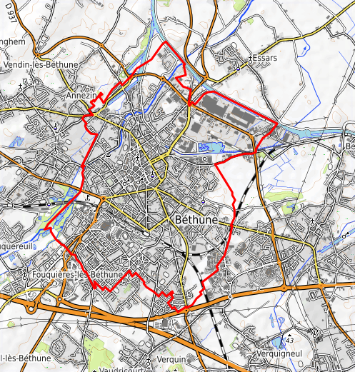 carte réalisée sur umap This map may be incomplete, and may contain errors. Don't rely solely on it for navigation.